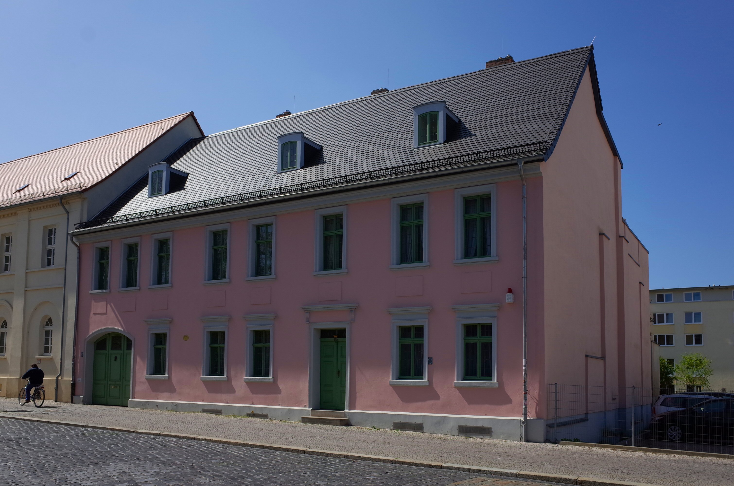 Dessau-Roßlau, Johannisstraße 10, Palais Minckwitz (Baudenkmal im Denkmalverzeichniss Sachsen-Anhalt, Erfassungsnummer: 094 40828 000 000 000 000 [1])